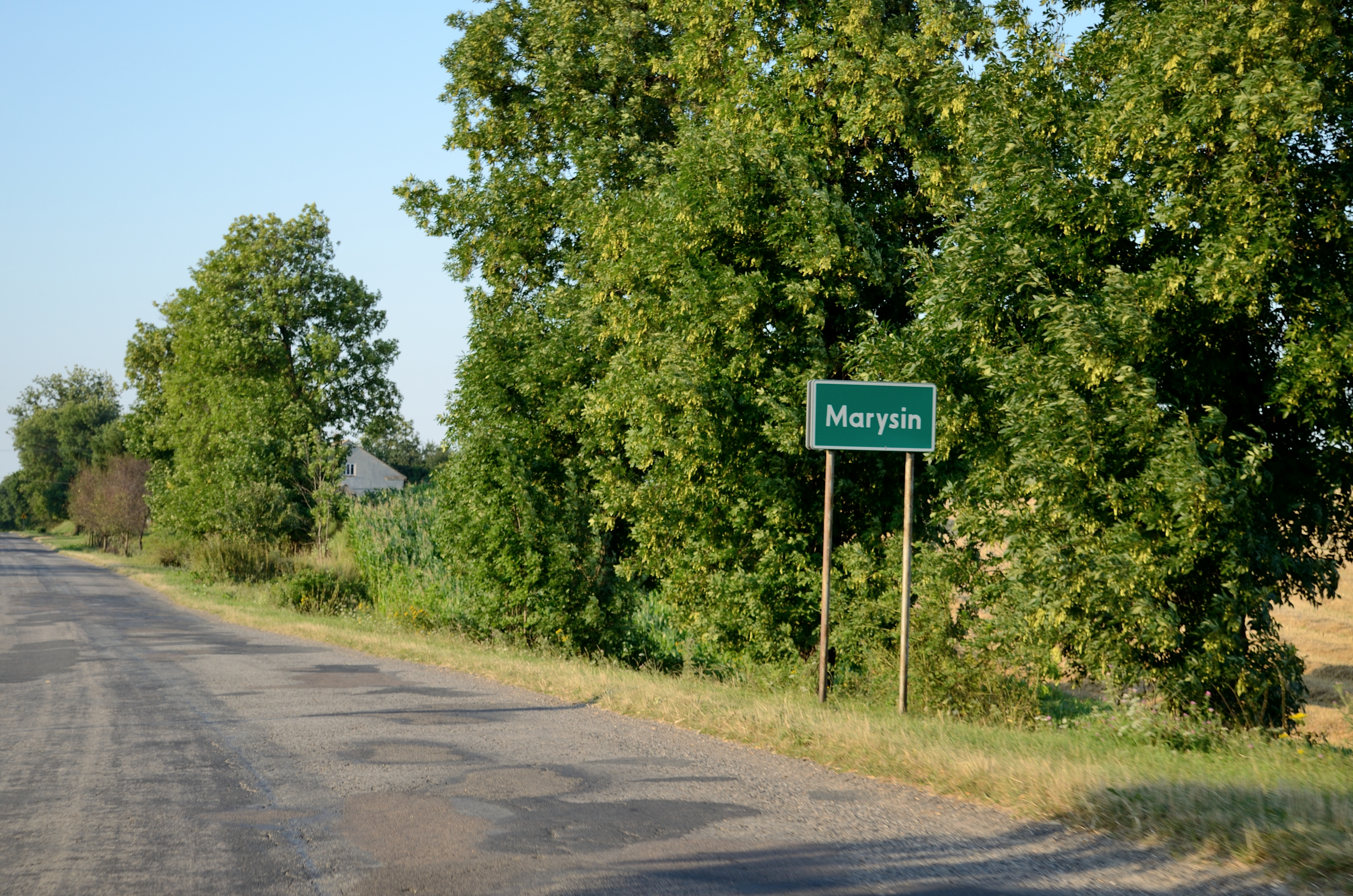 Marysin - znak